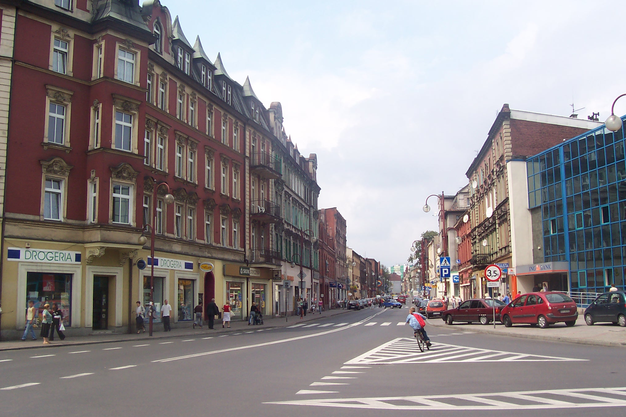 ul. Świerczewskiego - Siemianowice